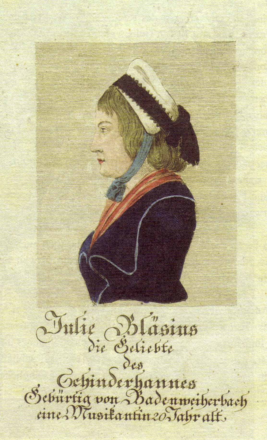 Juliana Blasius (Ehefrau des Schinderhannes), Flugblatt nach der Hinrichtung des Schinderhannes 1803